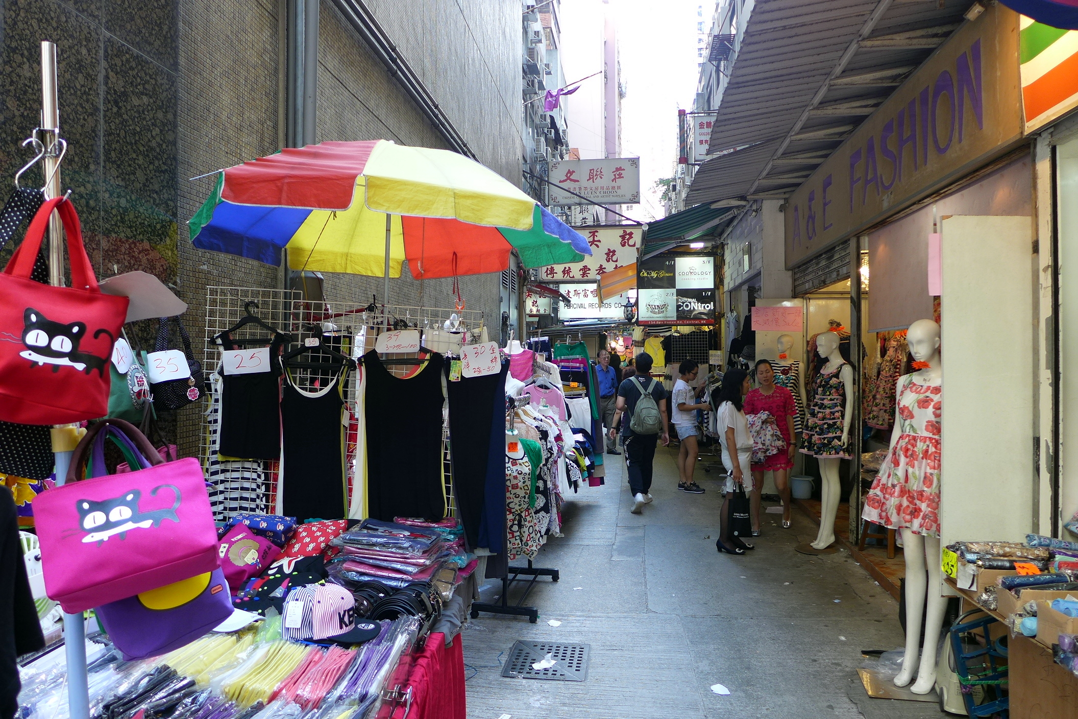 Wing Kut Street